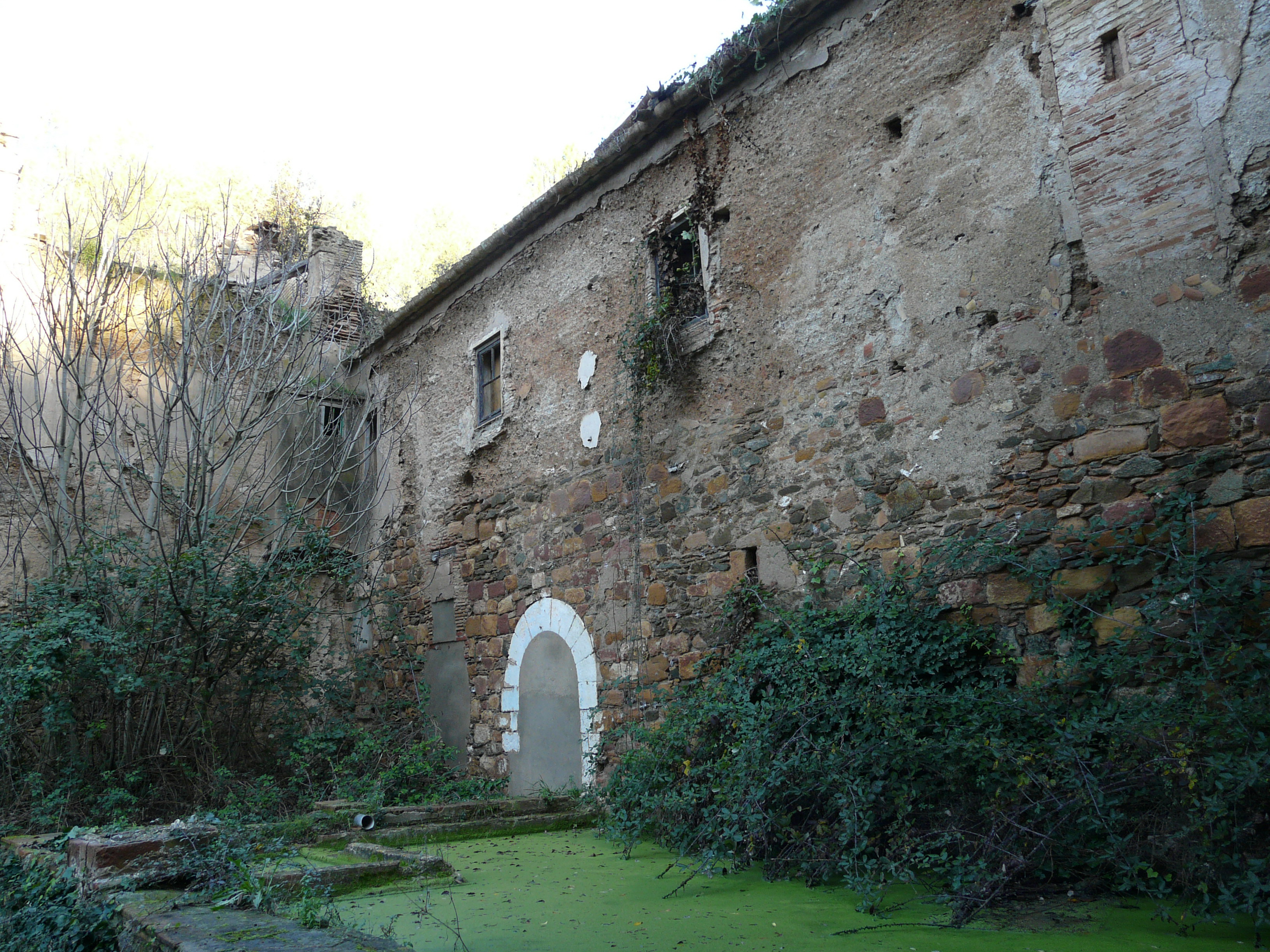 Antic Monestir de Santa Margarida de Valldonzella (Barcelona). El que en queda és la façana d'una masia sense res al darrera, algunes parets més, i un parell de basses, tot cobert d'esbarzers i d'heura i les basses plenes de llentia d'aigua.